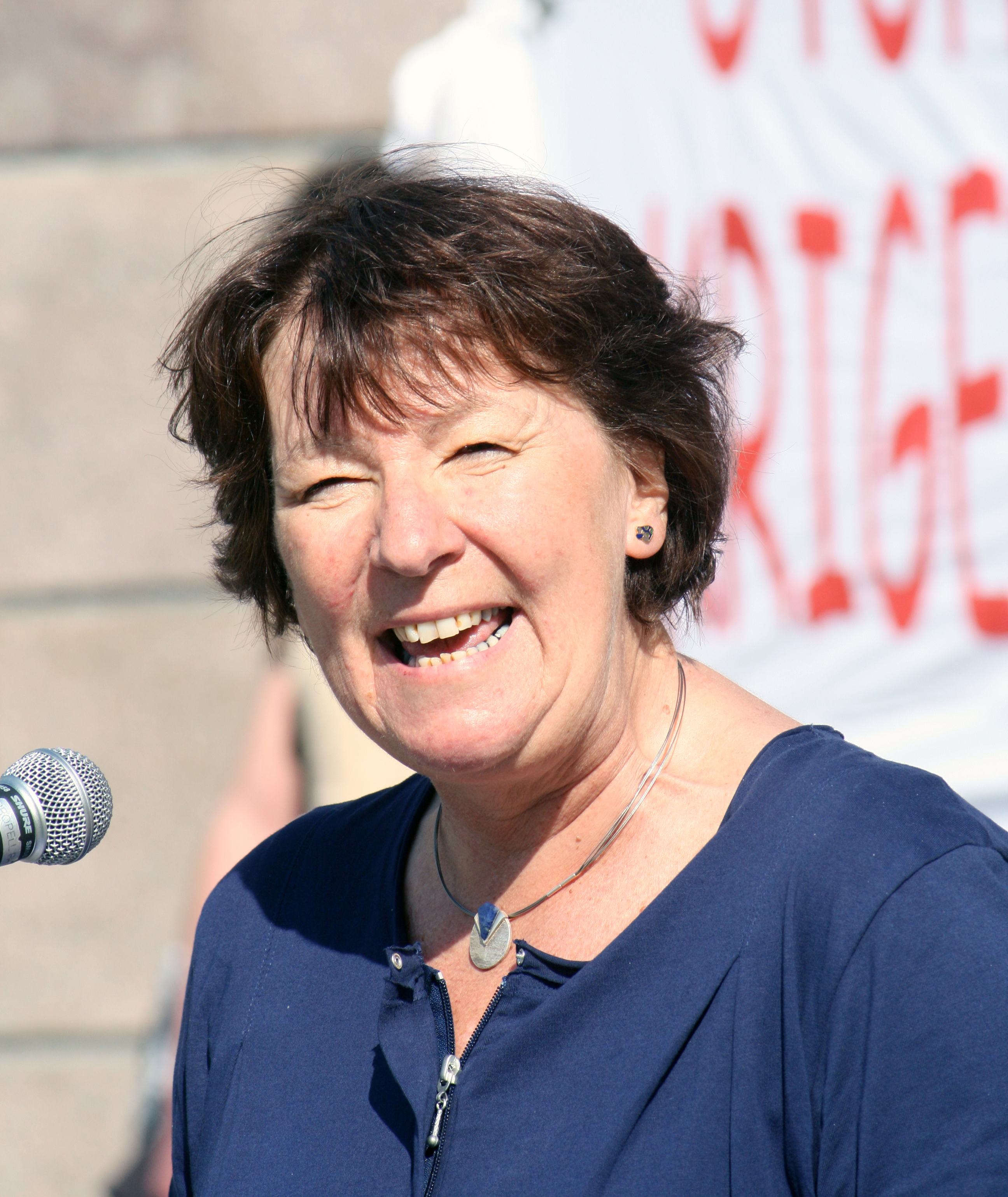 SVs ordførerkandidat i Oslo, Marianne Borgen holdt appell utenfor Stortinget på slutten av Fredsmarsj 2011.